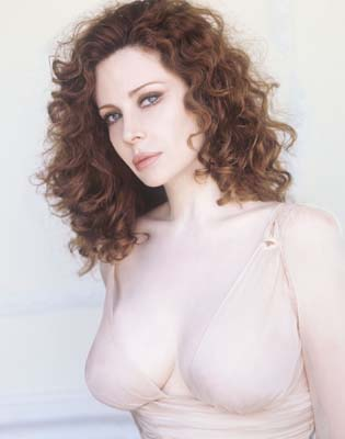 Francesca Dellera, attrice italiana.